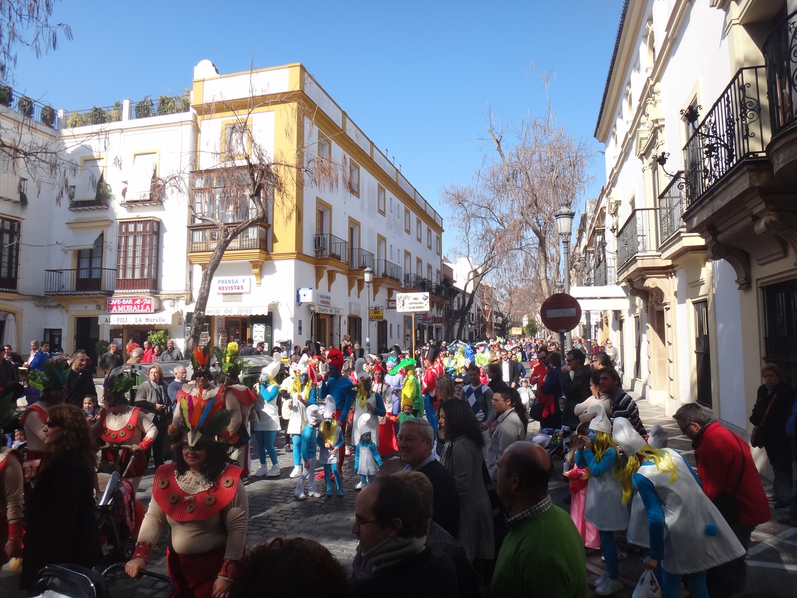 Carnaval de Jerez de la Frontera 2012 (Andalucía, España)